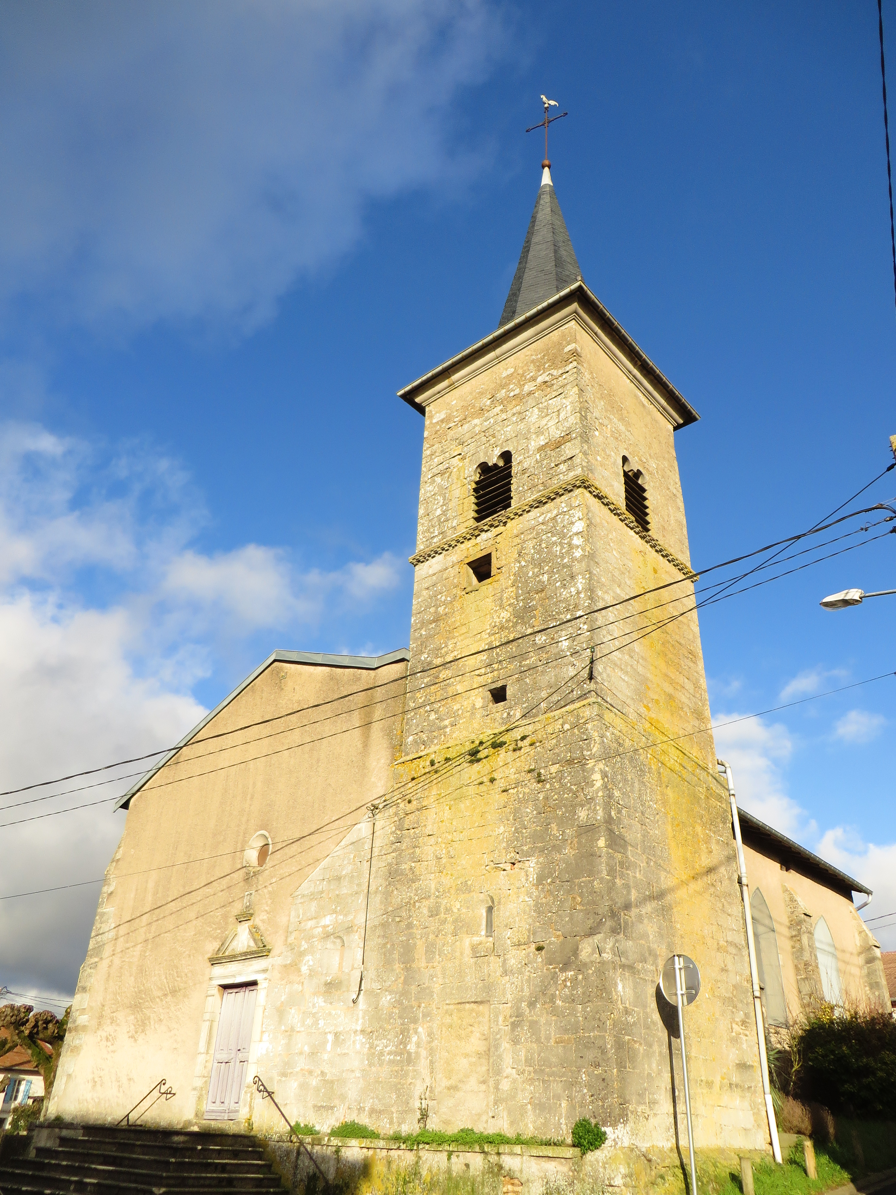 Domevre Haye eglise